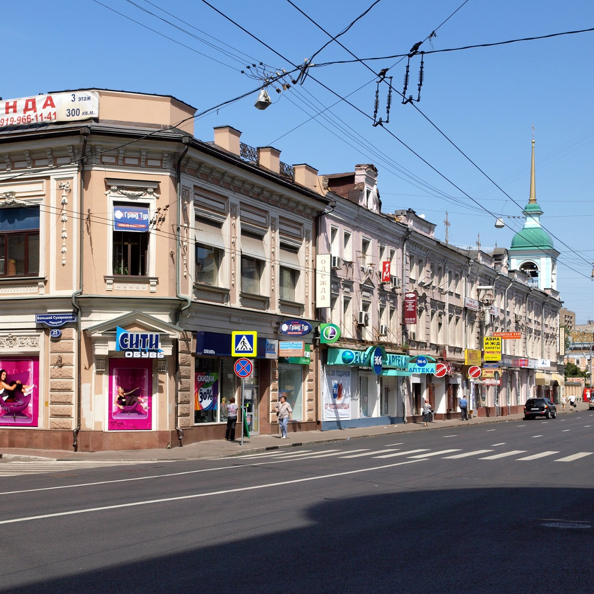 Улица Сретенка, Москва.